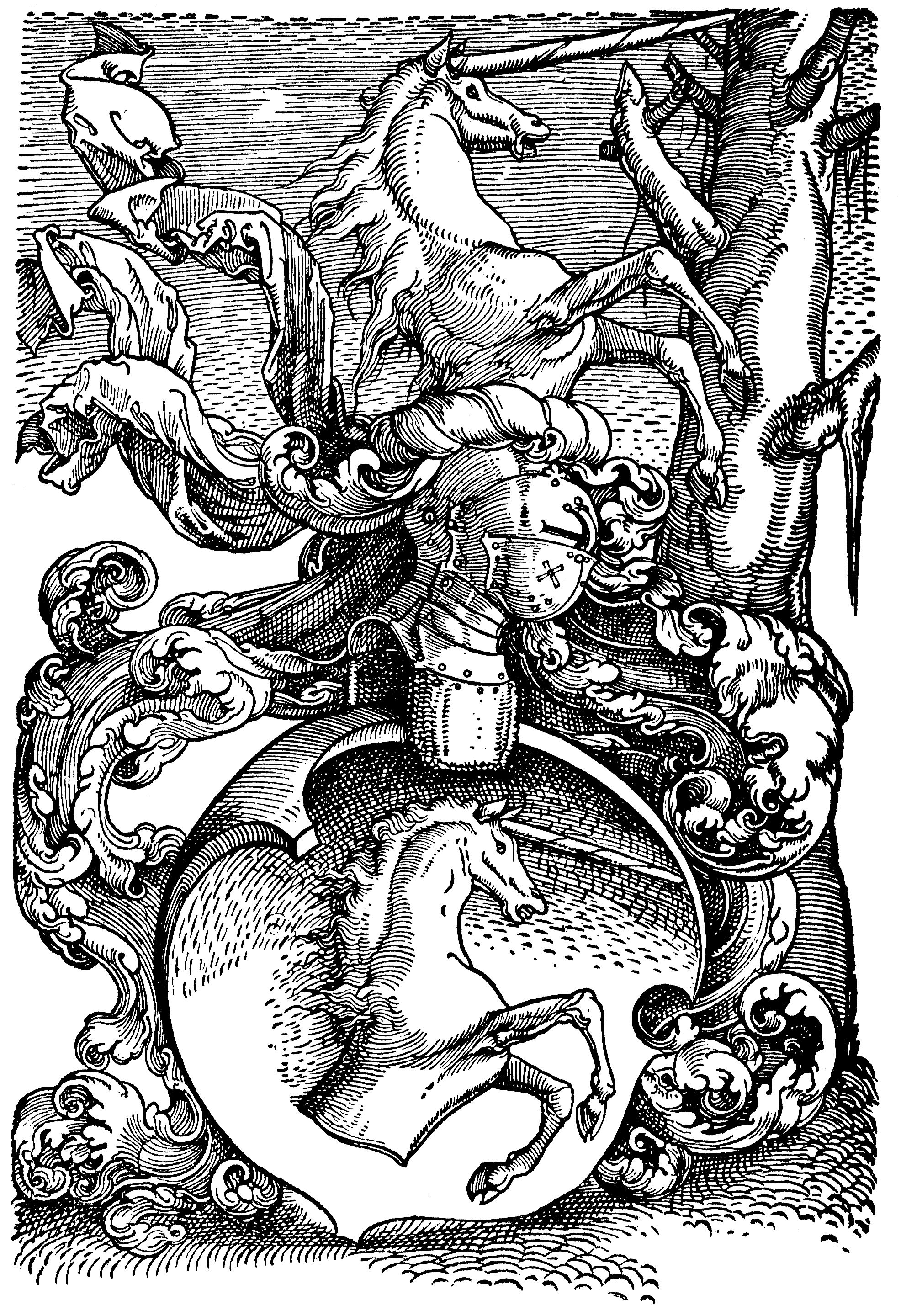 Wappen der Familie Baldung. Künstler: Baldung Grien, Hans Entstehungsjahr: um 1530 Maße: 17,7 × 11,9 cm Technik: Holzschnitt Epoche: Renaissance Land: Deutschland